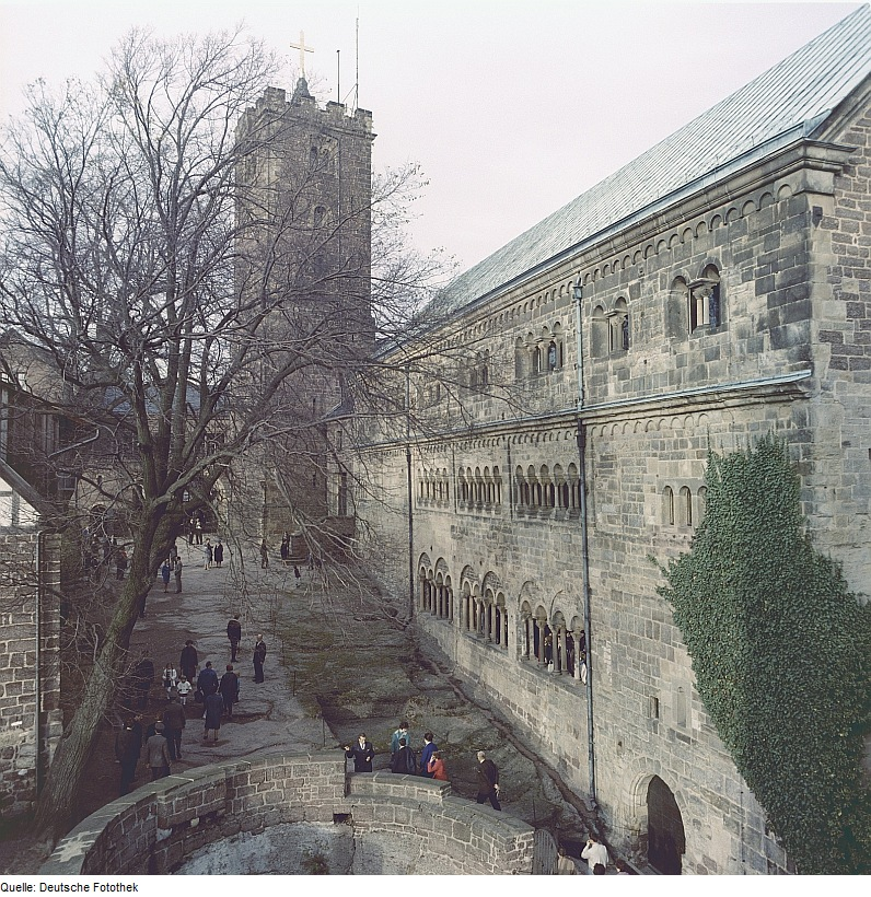 Original image description from the Deutsche Fotothek Eisenach. Wartburg, Blick in den Burghof mit Brunnen